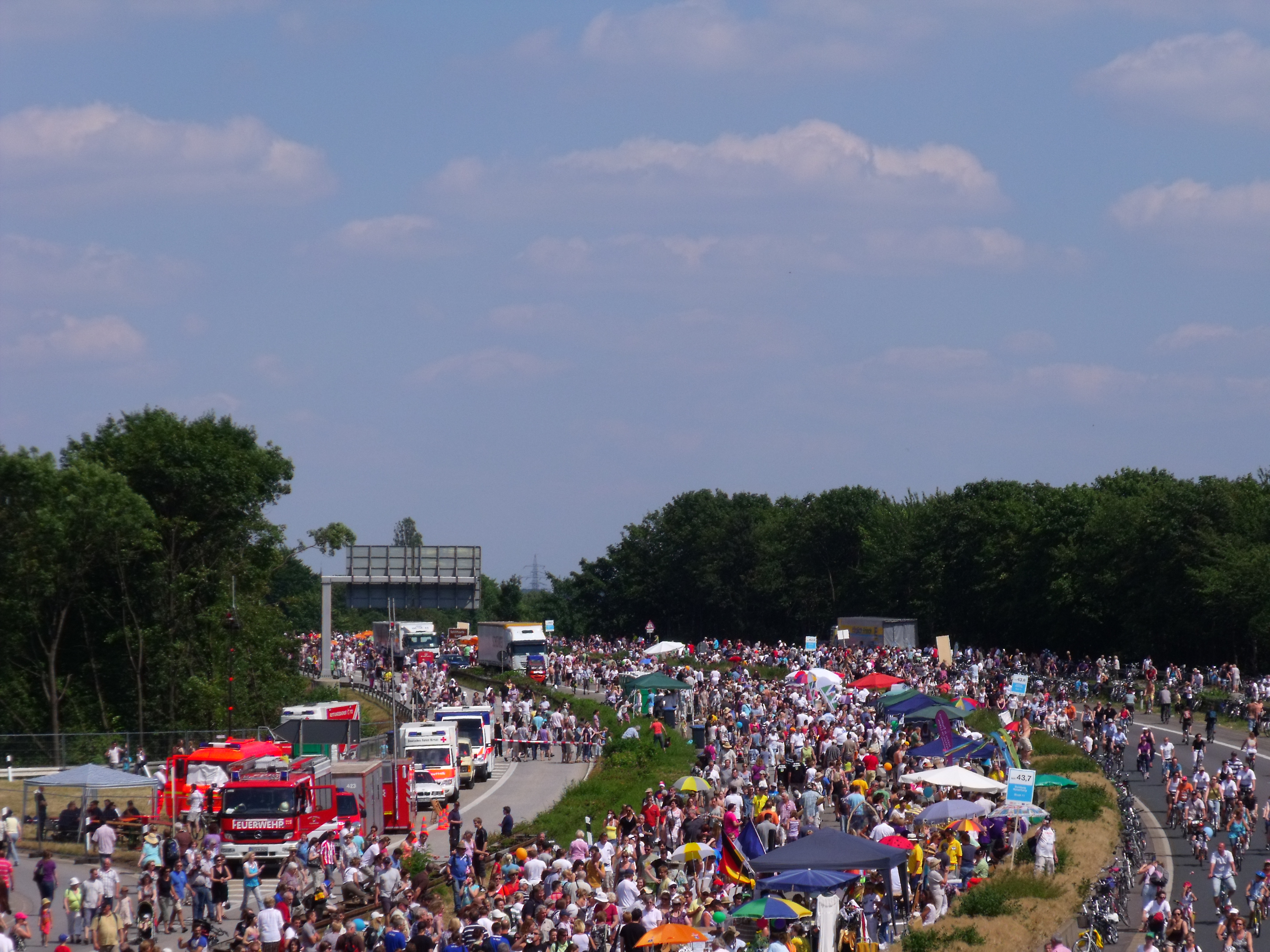 Kreuz Kaiserberg am Spaghettiknoten